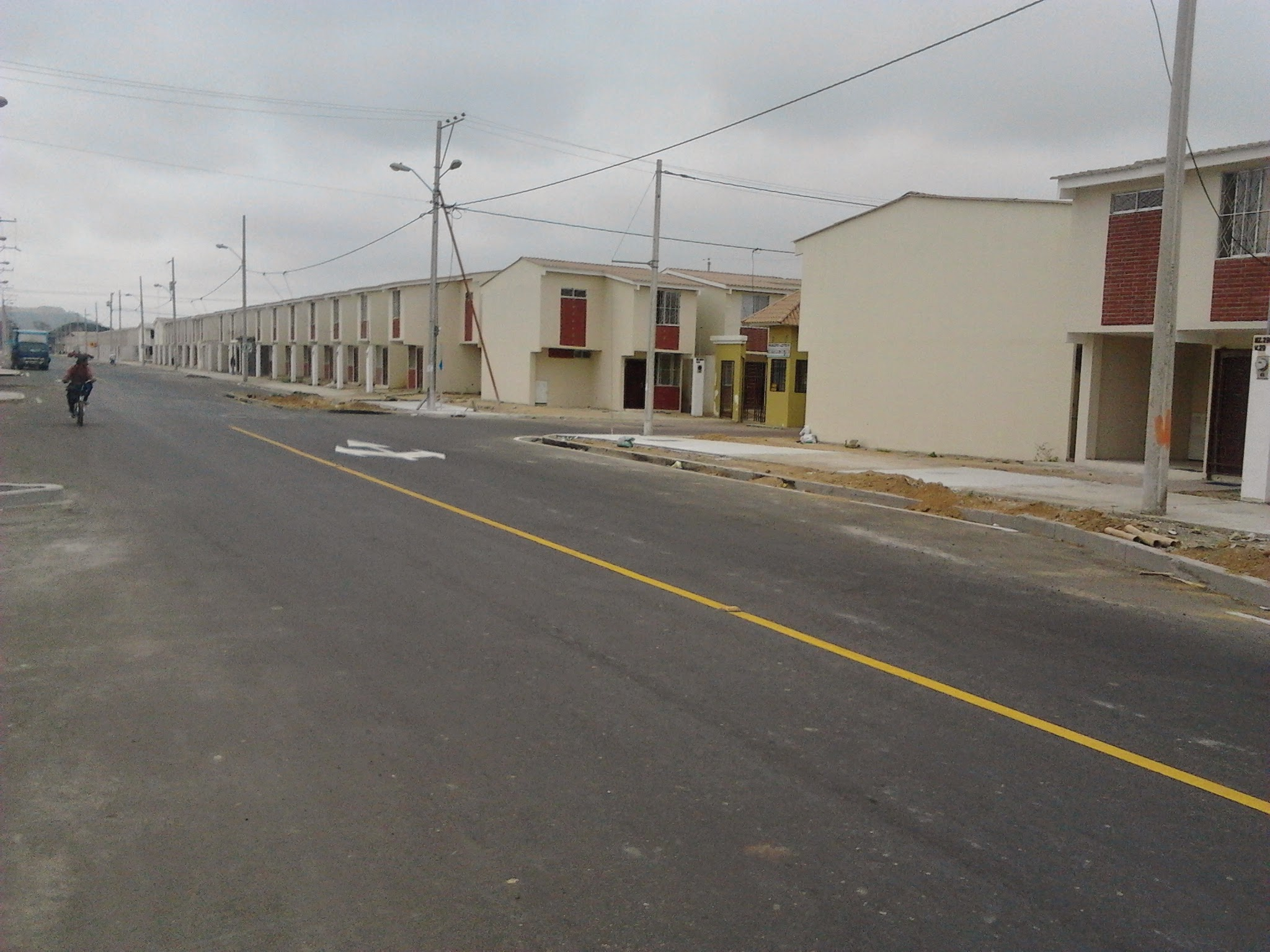 Barrios de Guayaquil